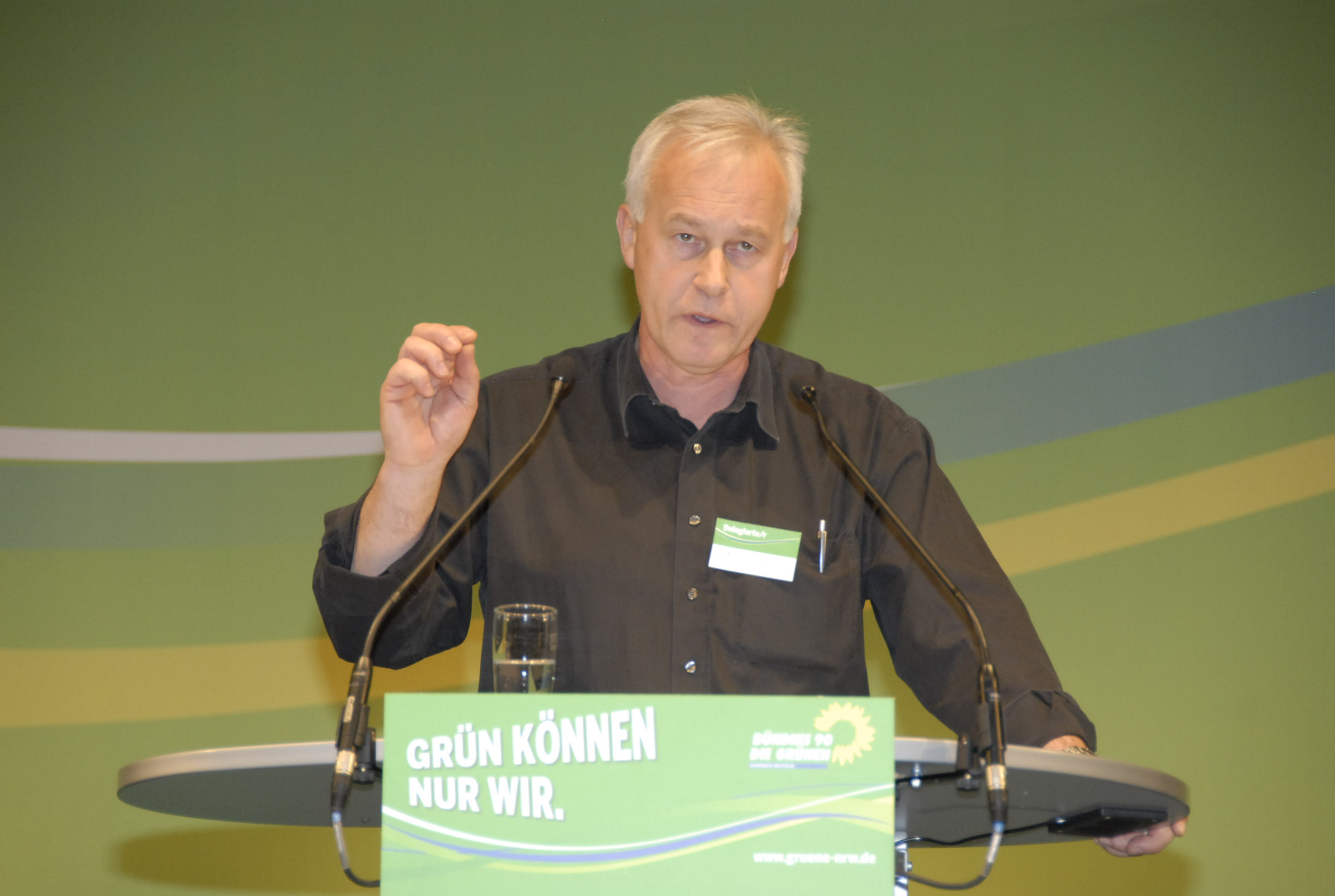 Ewald Groth LDK Hamm 2009-11